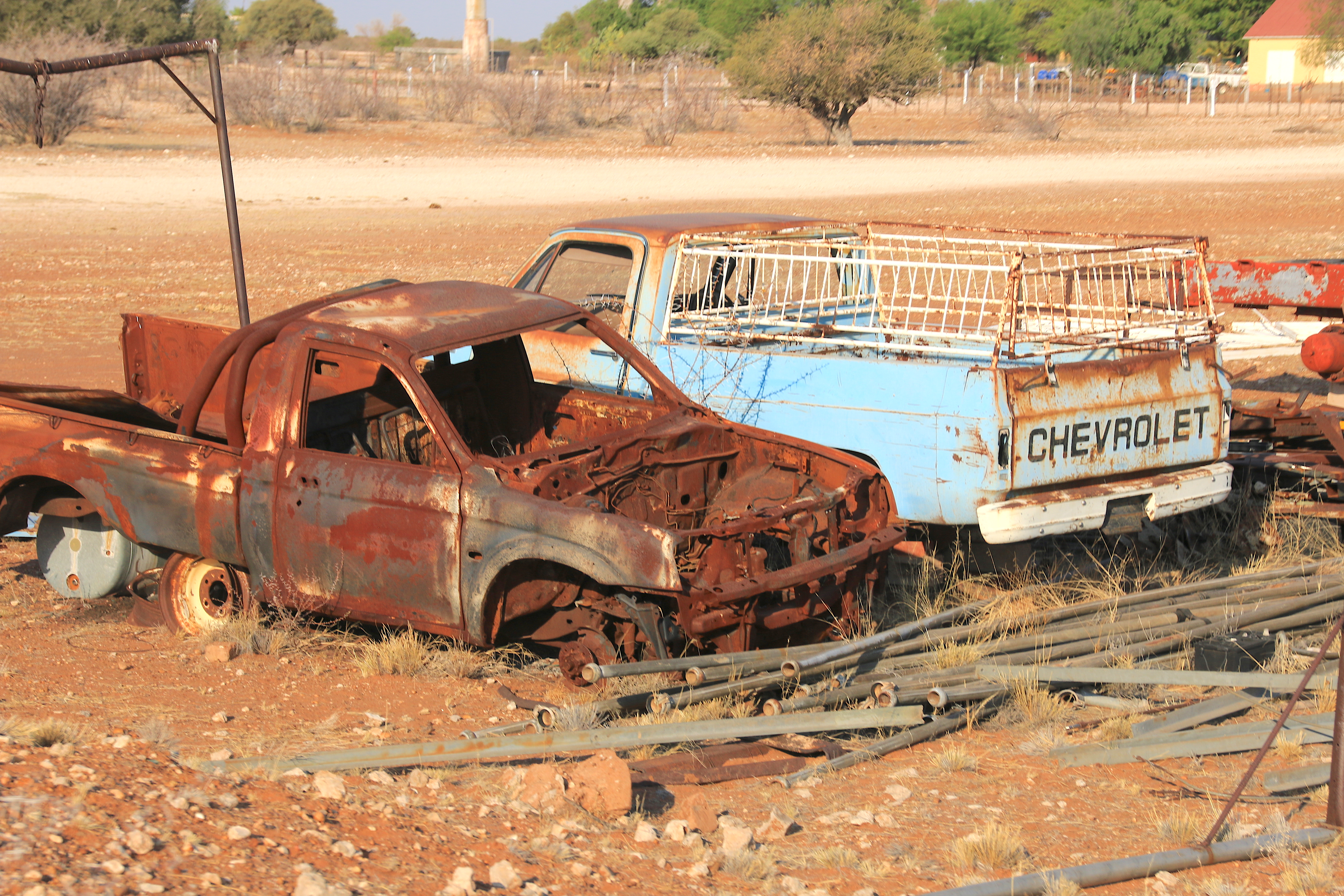 Schrotthalde auf Farm Langverwacht (2018)